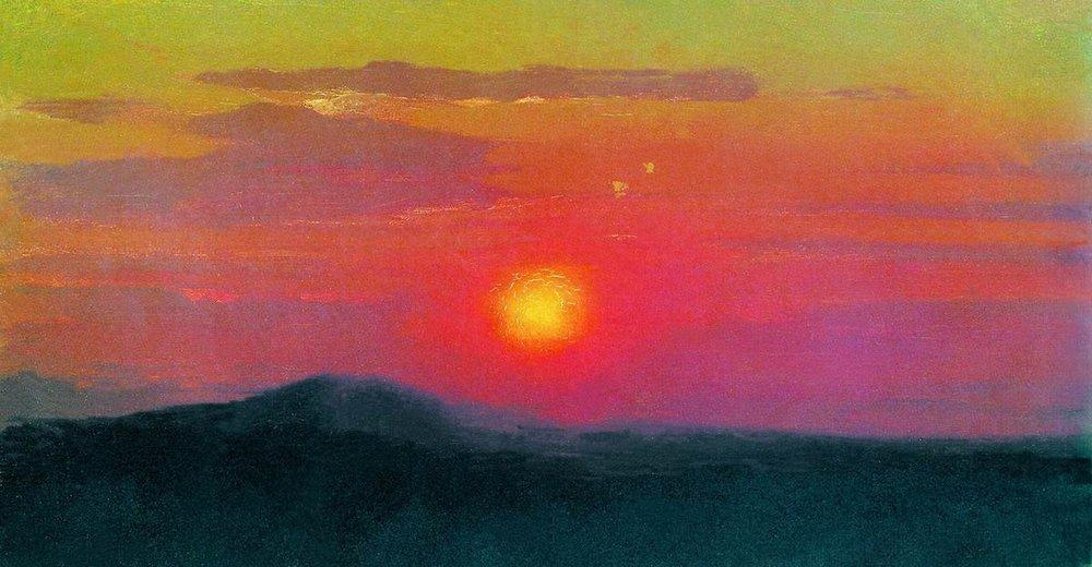 Эскиз к одноименной картине (1905–1908)